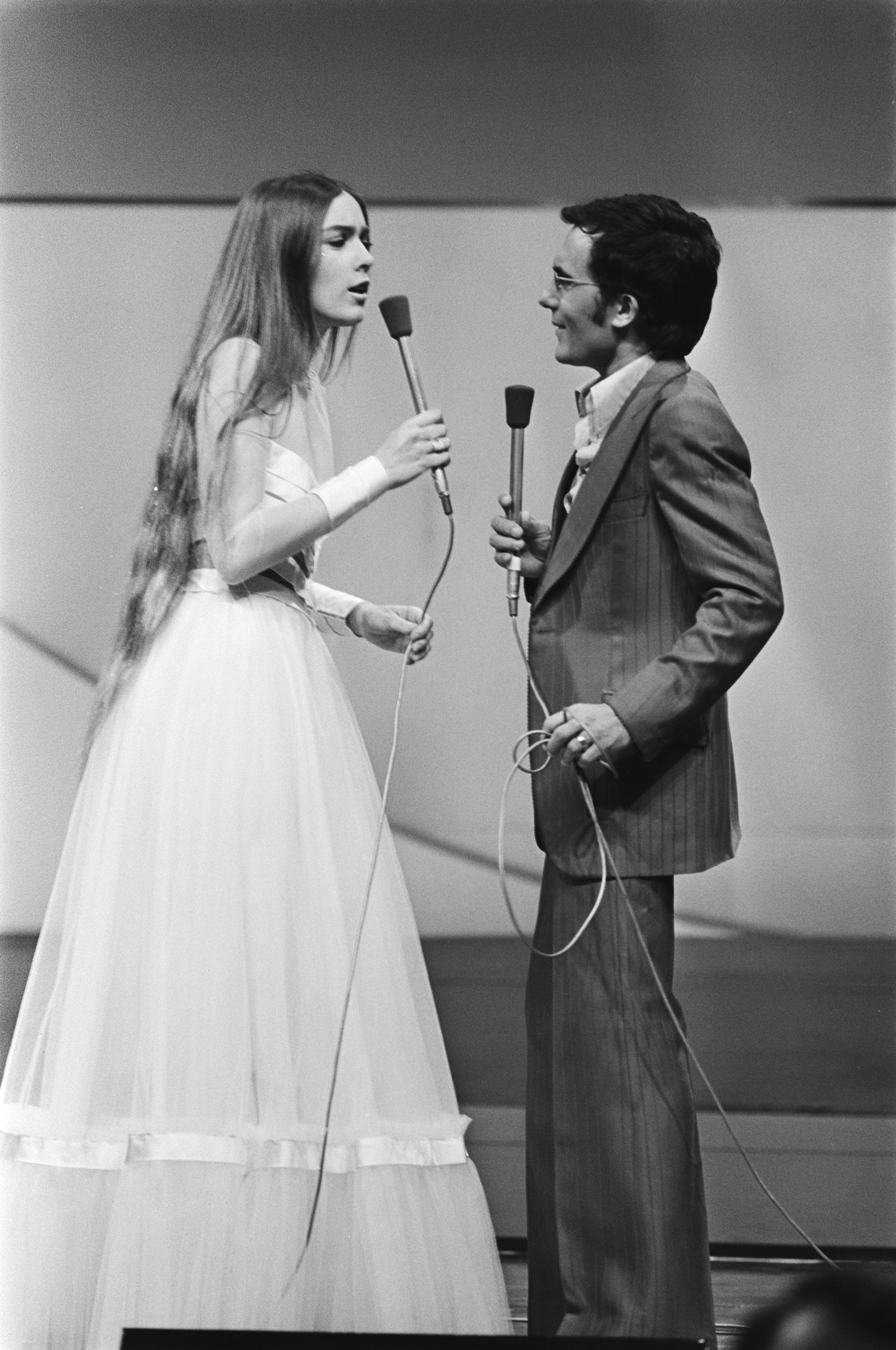 Collectie / Archief : Fotocollectie Anefo Reportage / Serie : [ onbekend ] Beschrijving : Eurovisie Songfestival 76 Den Haag ; Albano en Romina (Italie) Datum : 3 april 1976 Locatie : Den Haag, Italië Trefwoorden : songfestivals Persoonsnaam : Eurovisie Songfestival Fotograaf : Mieremet, Rob / Anefo Auteursrechthebbende : Nationaal Archief Materiaalsoort : Negatief (zwart/wit) Nummer archiefinventaris : bekijk toegang 2.24.01.05 Bestanddeelnummer : 928-5023